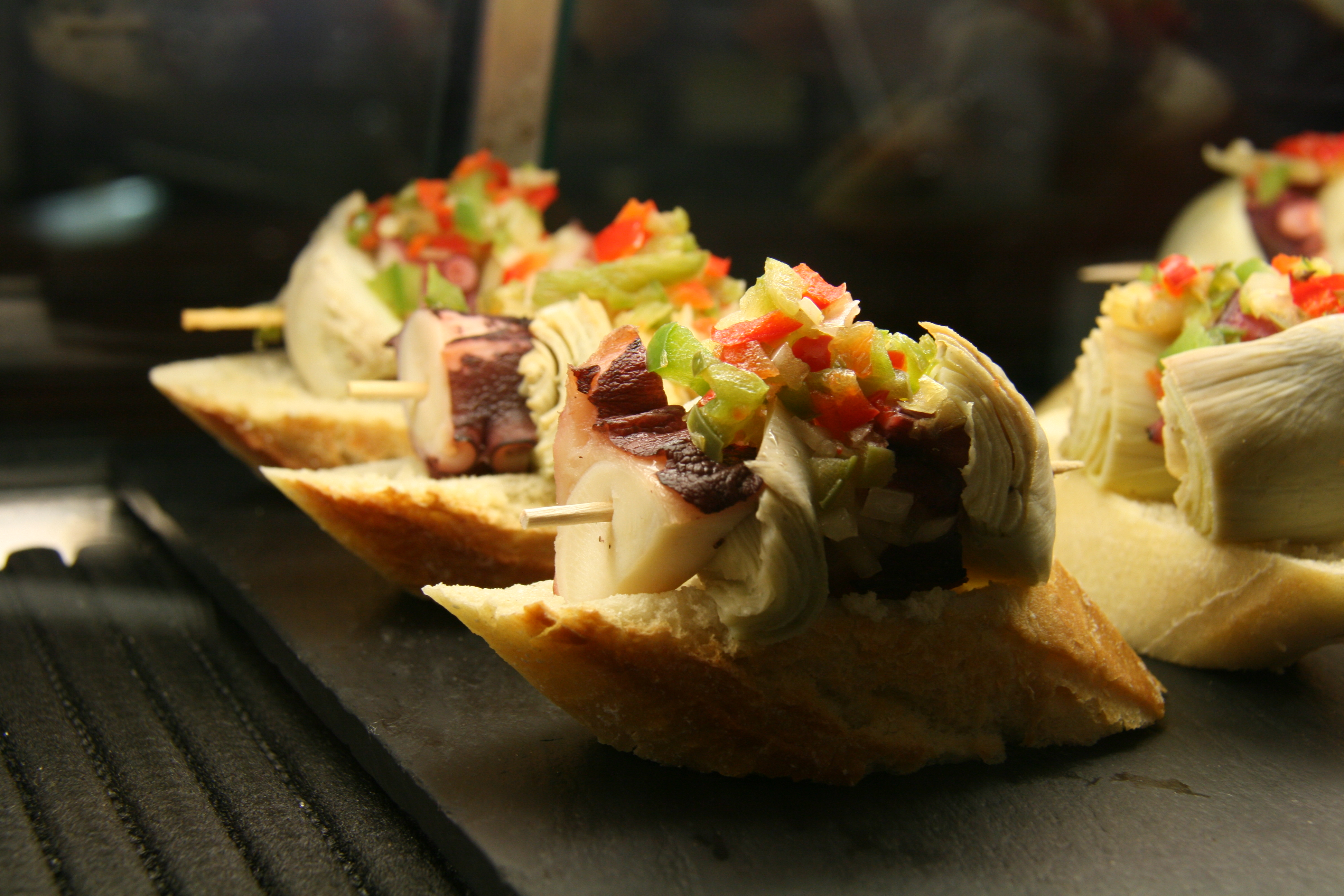 Pincho (pintxo) de pulpo con alcahofa